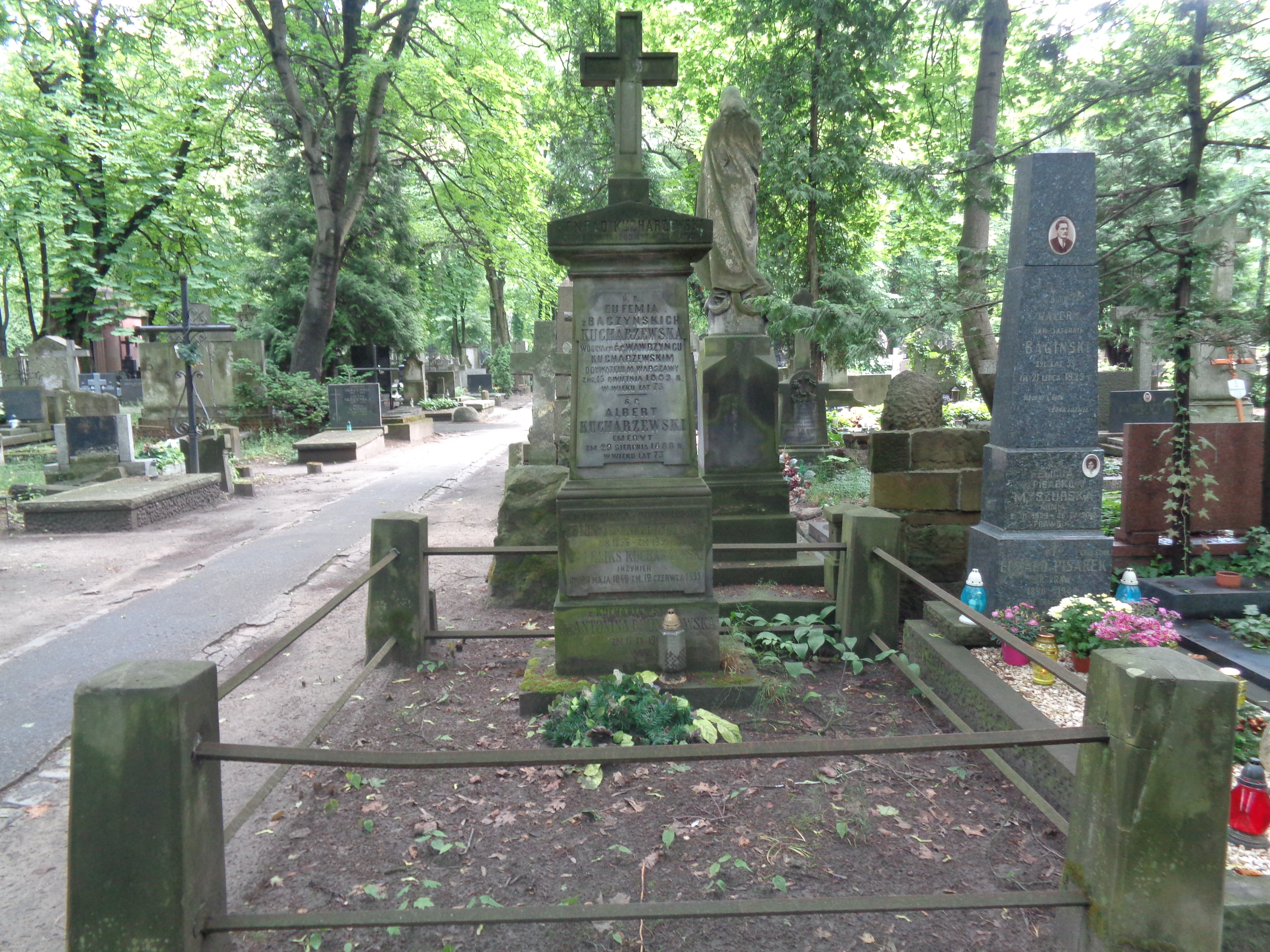 Grób Feliksa Kucharzewskiego na Cmentarzu Powązkowskim